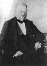 Foto de Joseph Jean Baptiste Xavier Fournet.